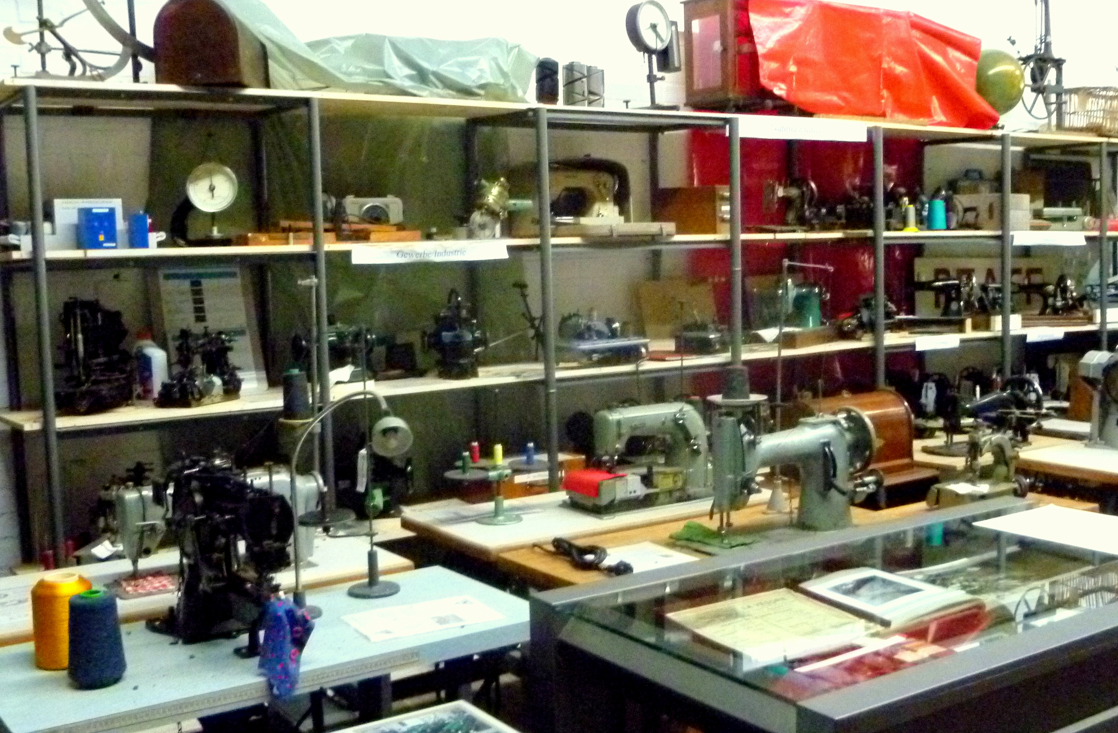 Sammlung Historischer Nähmaschinen im Tuchwerk Aachen